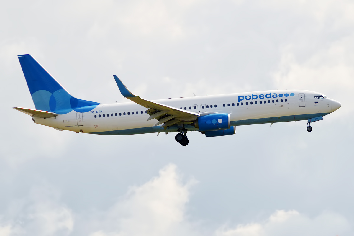 Pobeda, VQ-BTH, Boeing 737-8LJ